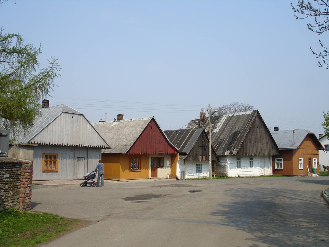 stare domy na rynku w jasliskach